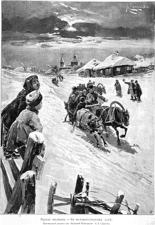 Масленица в малороссийском селе. "Всемирная иллюстрация", №5, 1896.